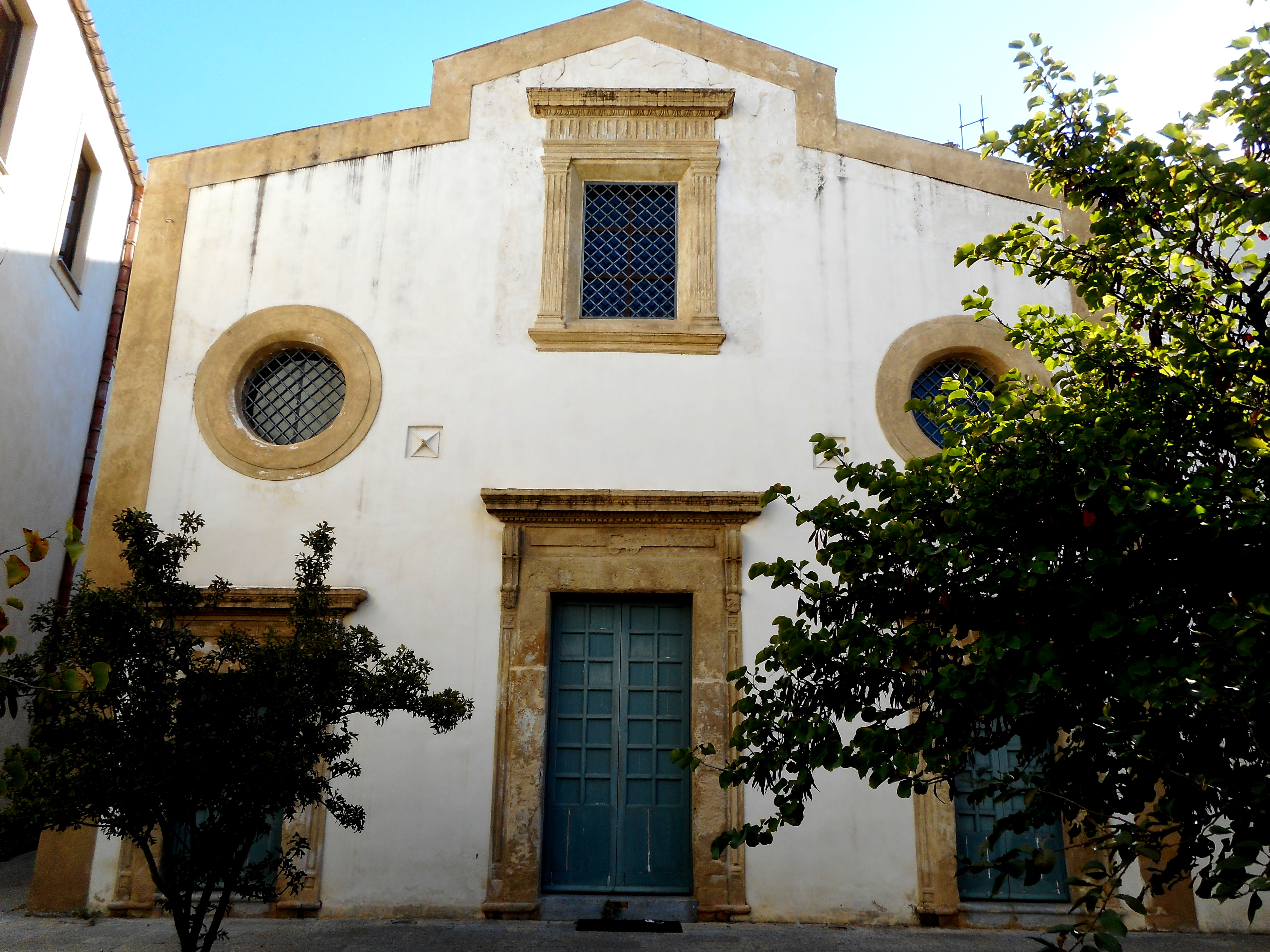 Facciata della chiesa dei Santi Crispino e Crispiniano all'interno della Biblioteca Comunale